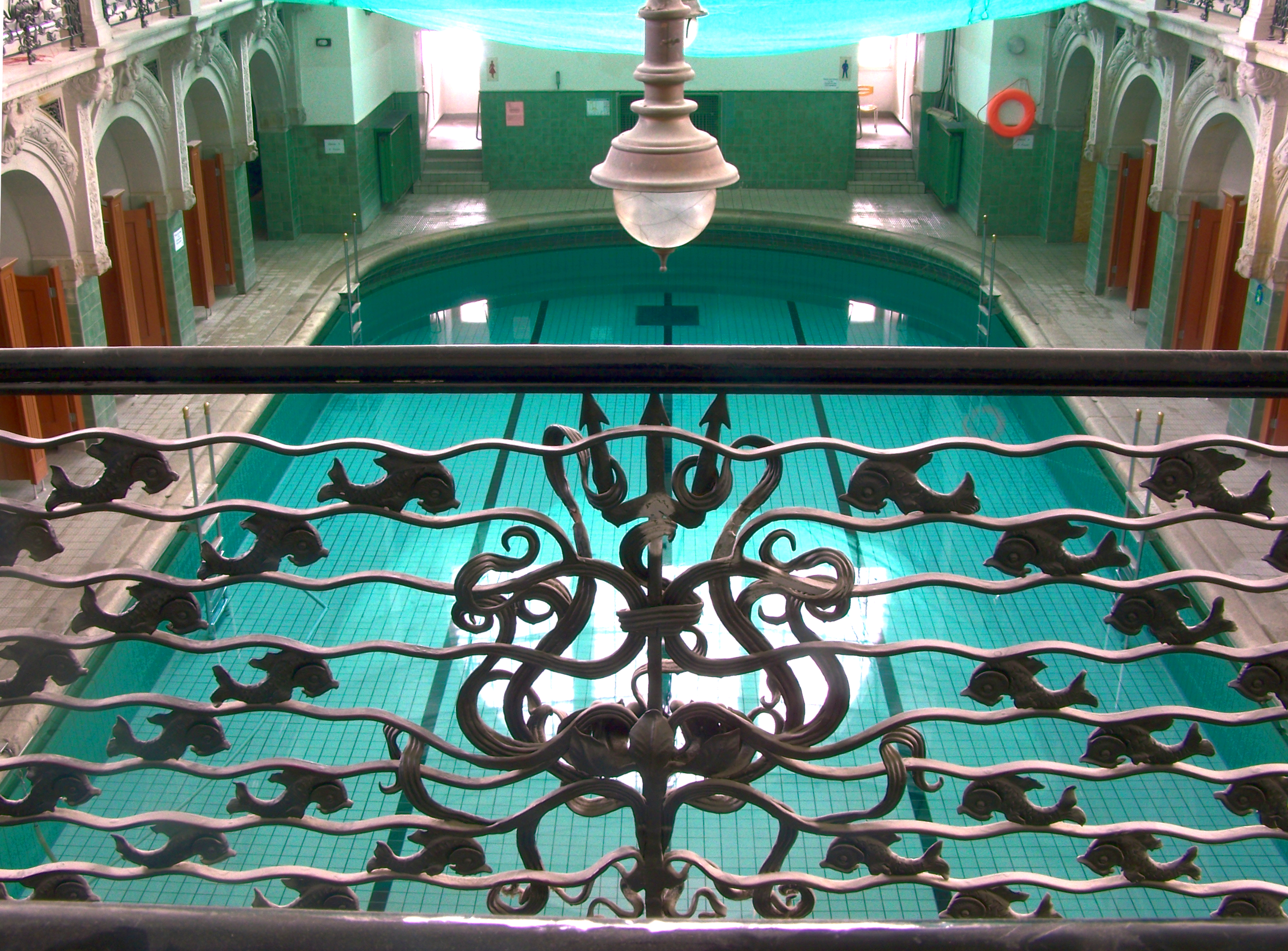 Die kleine Schwimmhalle im Baerwaldbad